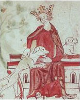 Jan I. Anglický